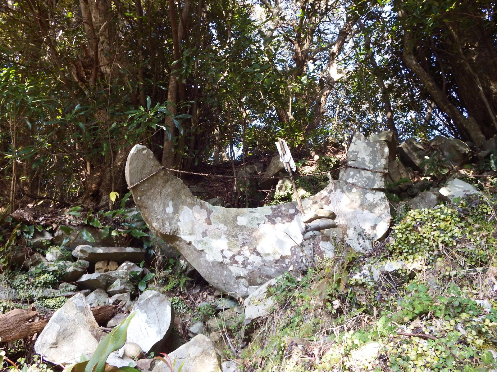 月山の御神体